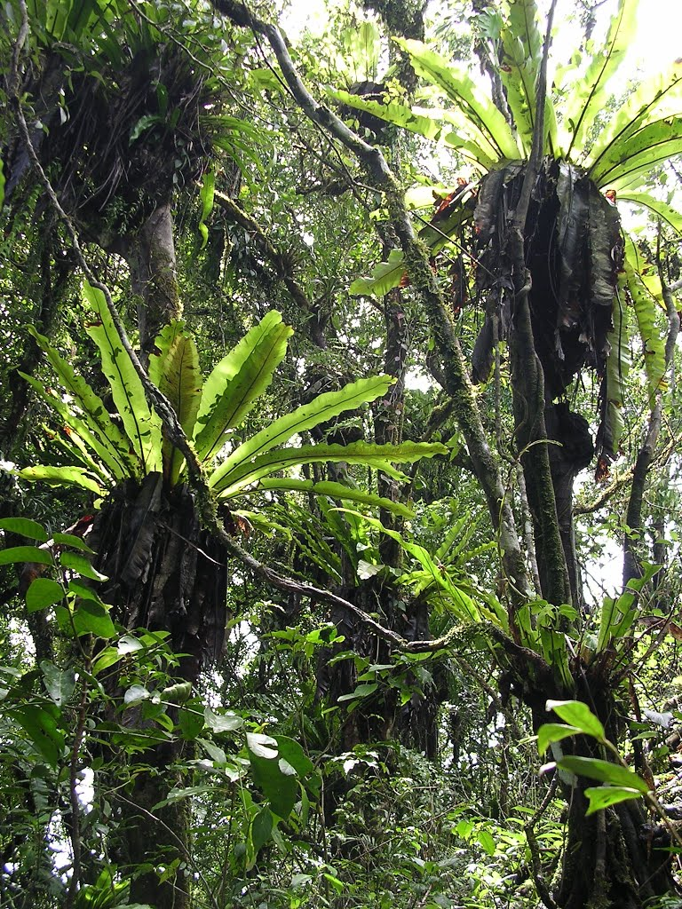 Birds nest ferns in tropical montane forest on Mt Manucoco, Atauro